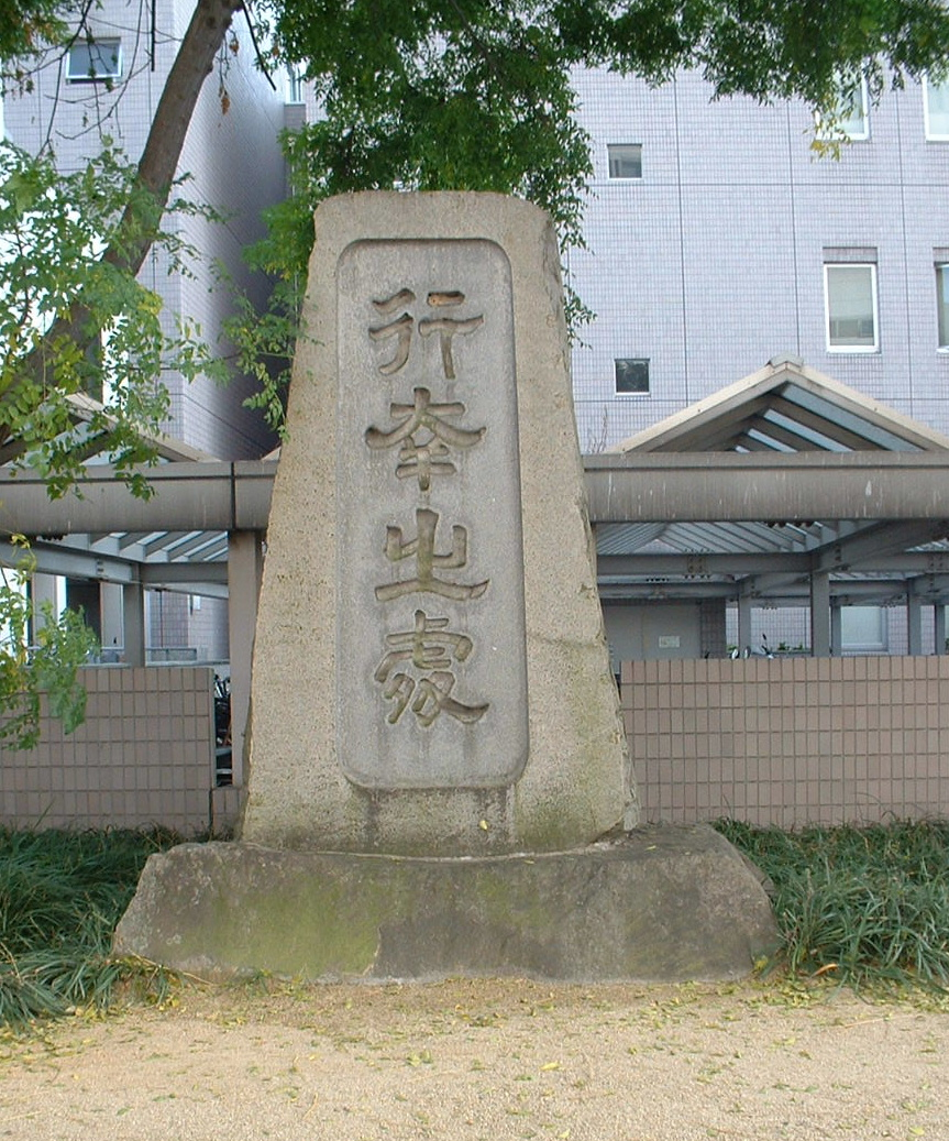 昭和天皇行幸記念碑（1931年）広島県福山市の市役所敷地内